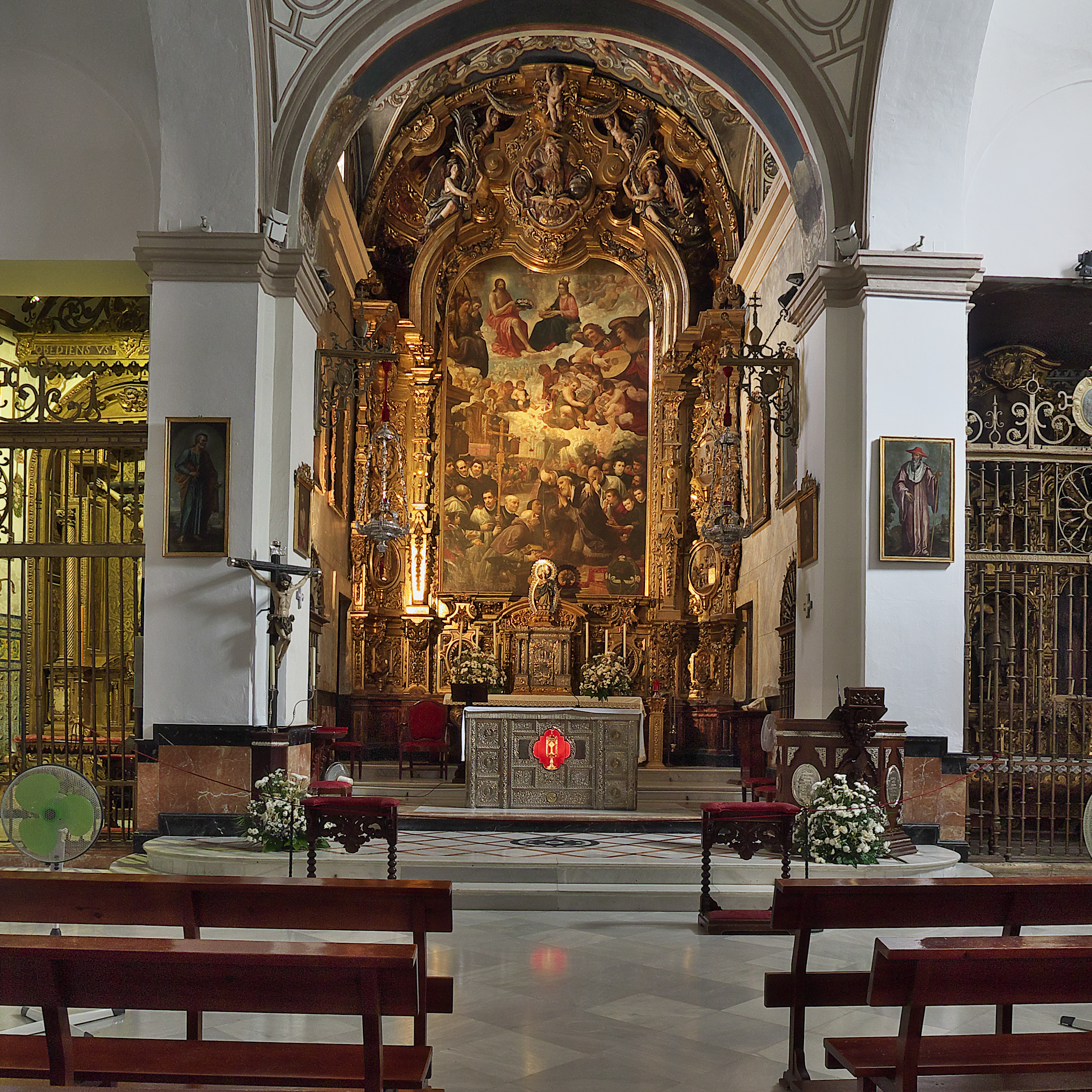 Juan de Roelas describe el Tránsito de San Isidoro (1613) para el retablo mayor, encuadrado con marco barroco de Felipe Fernández del Castillo (1752)